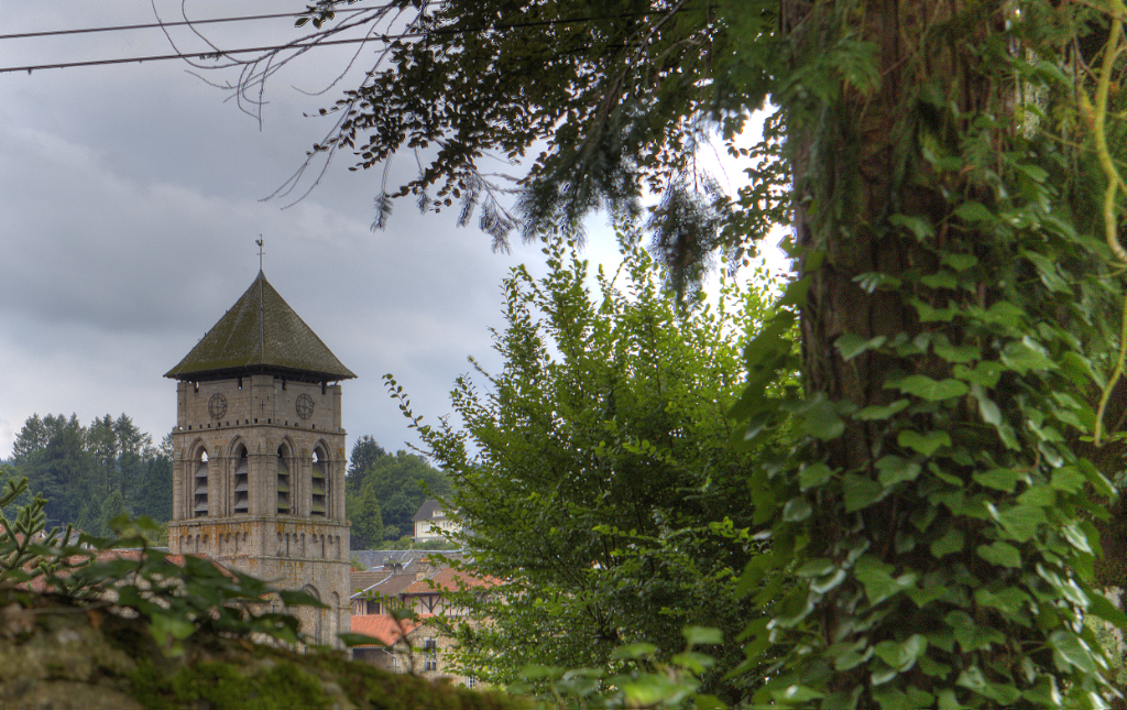 Collégiale Saint-Étienne d'Eymoutiers